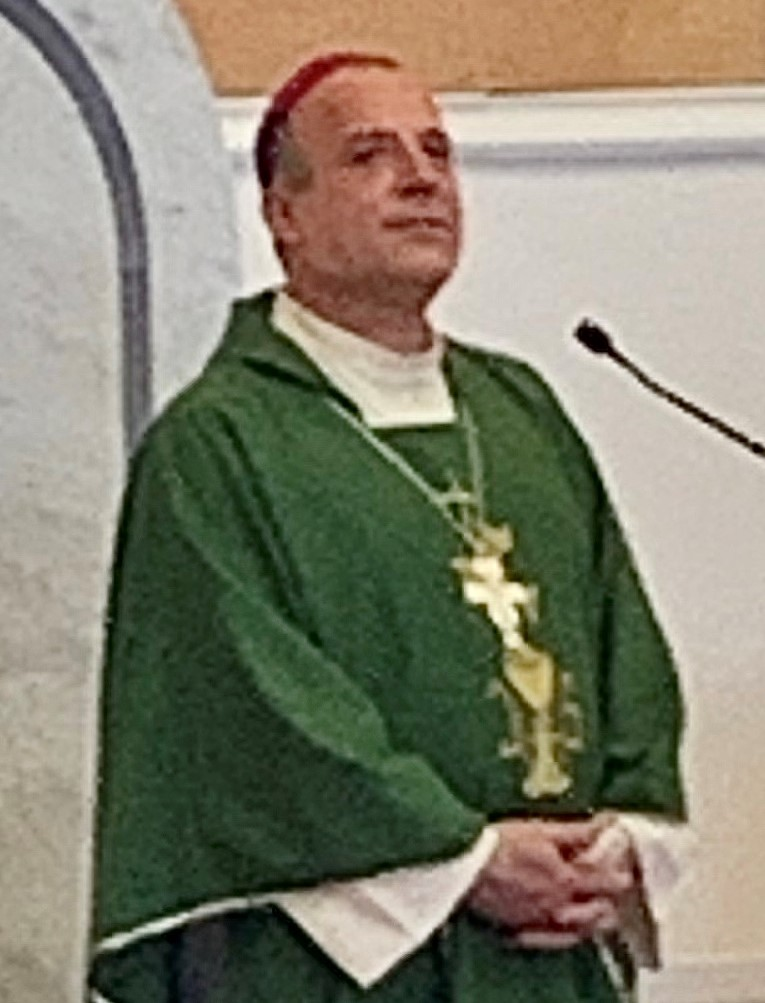 Mons. Angelo Raffaele Panzetta durante la Santa Messa celebrata nella chiesa del Santissimo Salvatore del quartiere Fondo Gesù di Crotone il 4 luglio 2020